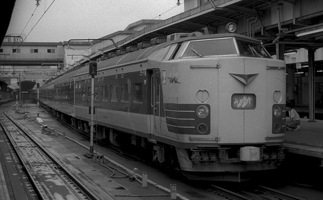 特急みちのく 1982年8月 上野駅